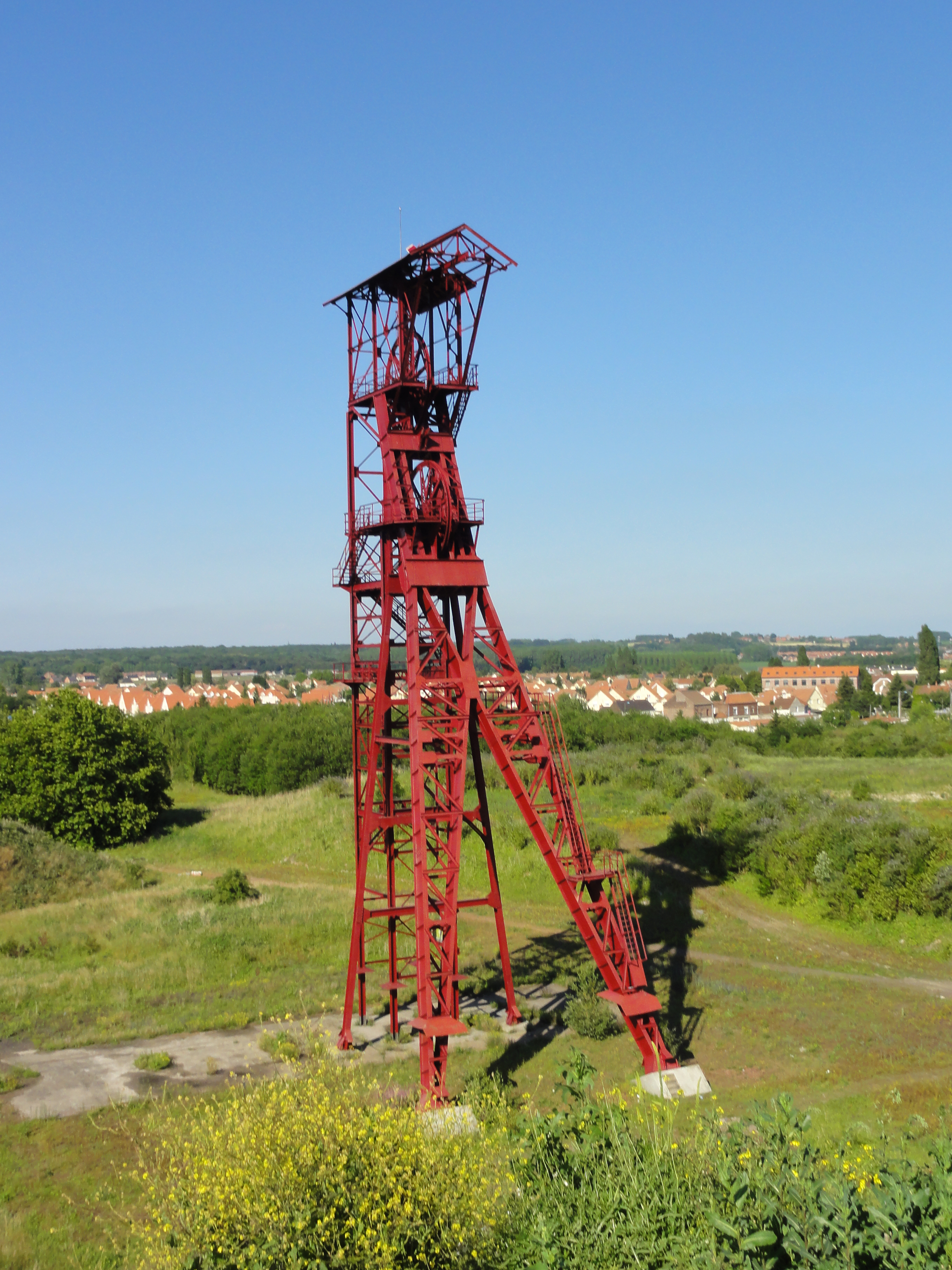 La fosse n° 8 - 8 bis de la Compagnie des mines de Dourges était un charbonnage du bassin minier du Nord-Pas-de-Calais constitué de deux puits situé à Évin-Malmaison, Pas-de-Calais, Nord-Pas-de-Calais, France. .